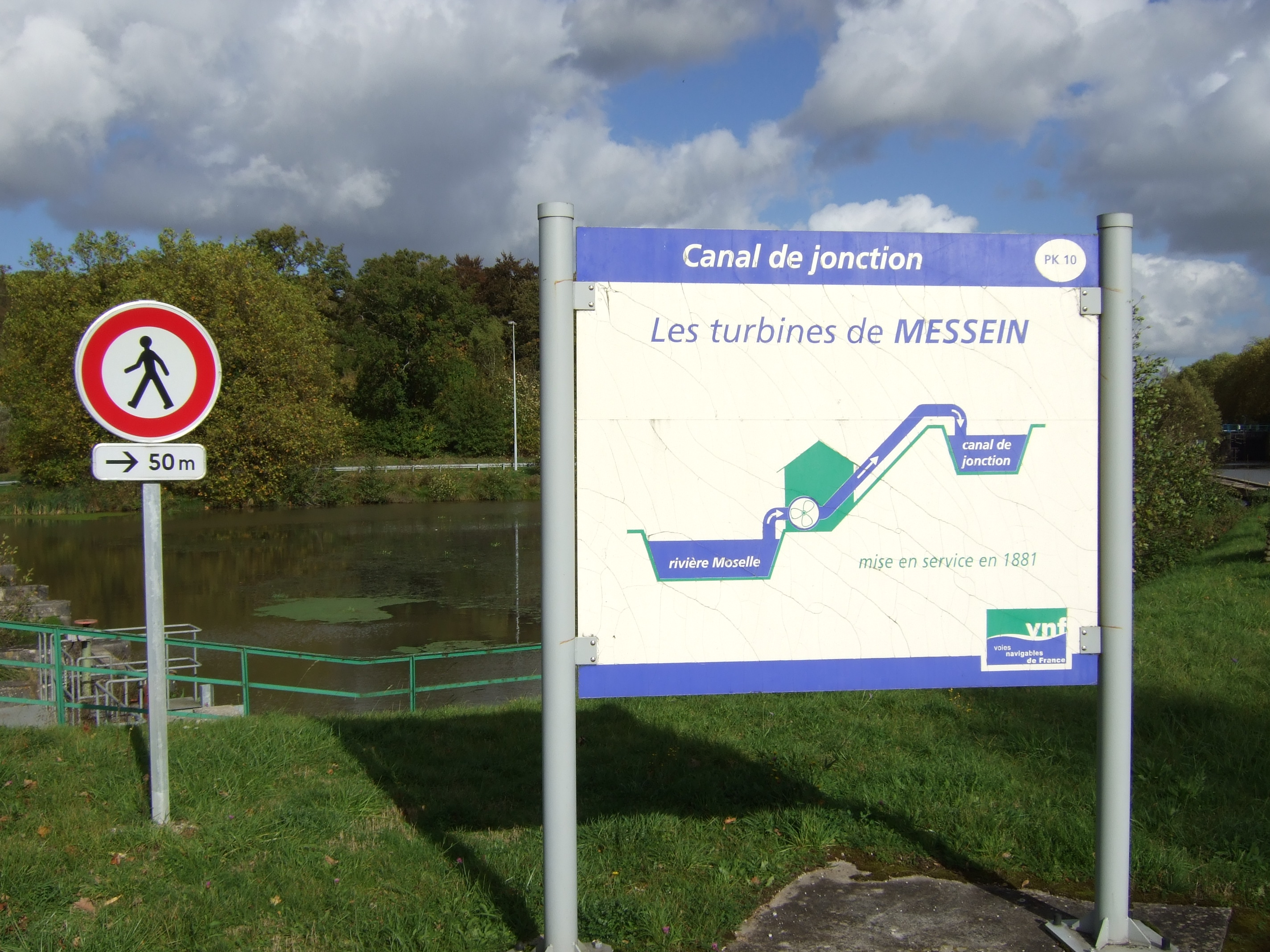 Canal de jonction de Nancy - Infotafel am Turbinenhebewerk